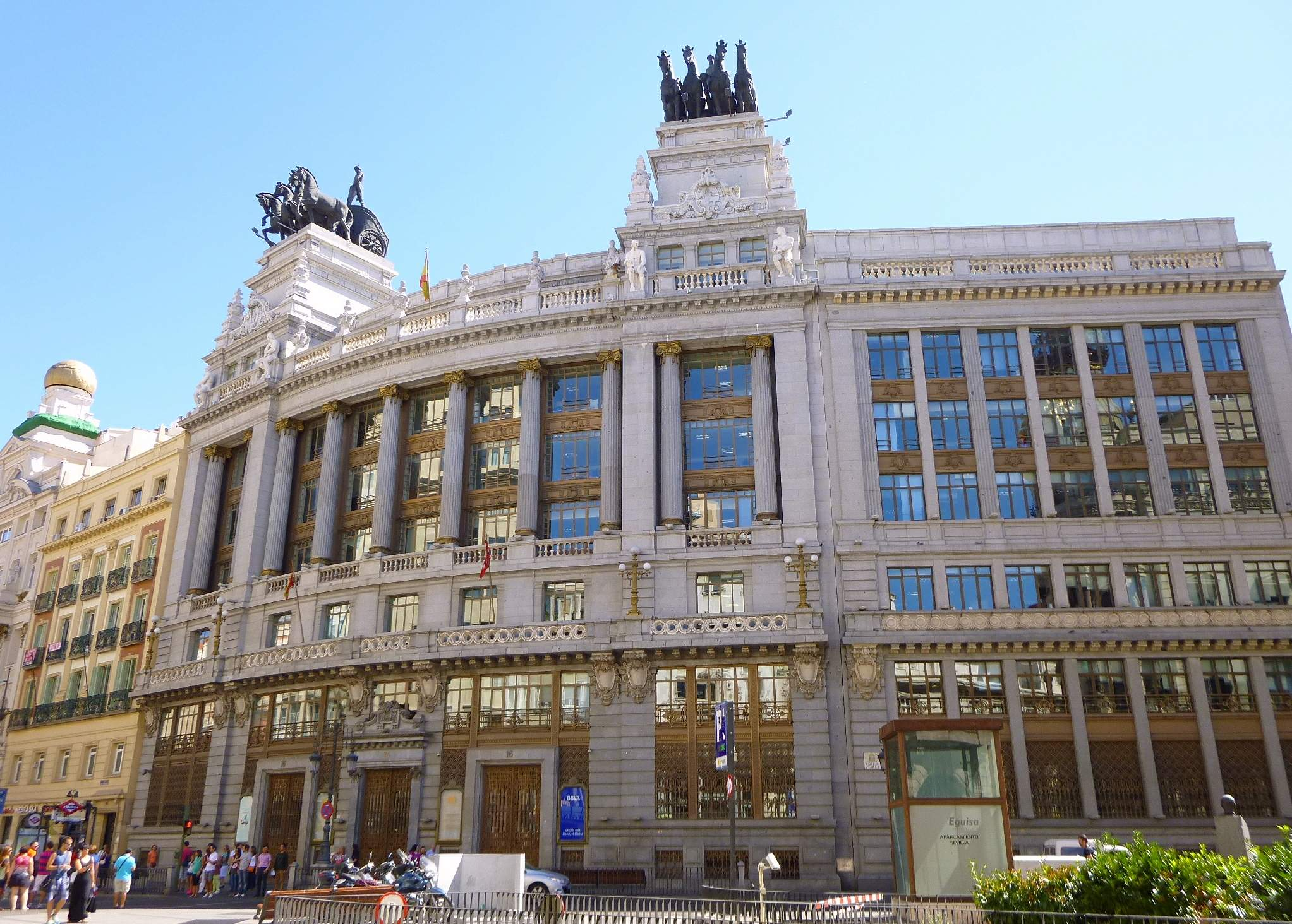 Edificio del Banco de Bilbao (Madrid)